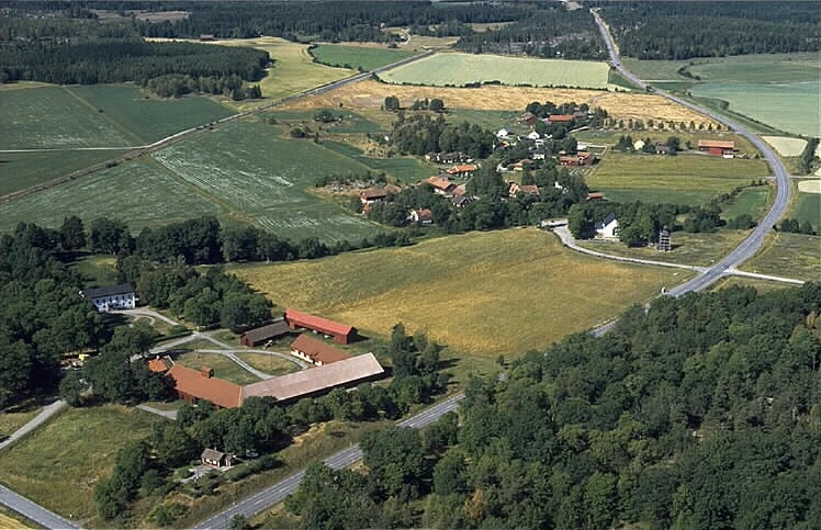 Motiv: Åland Nyckelord: Flygbilder, Riksintressen Kategori: Miljöer, Odlingslandskap Västerby, Ålands kyrka, Ålands socken, Riksväg 72